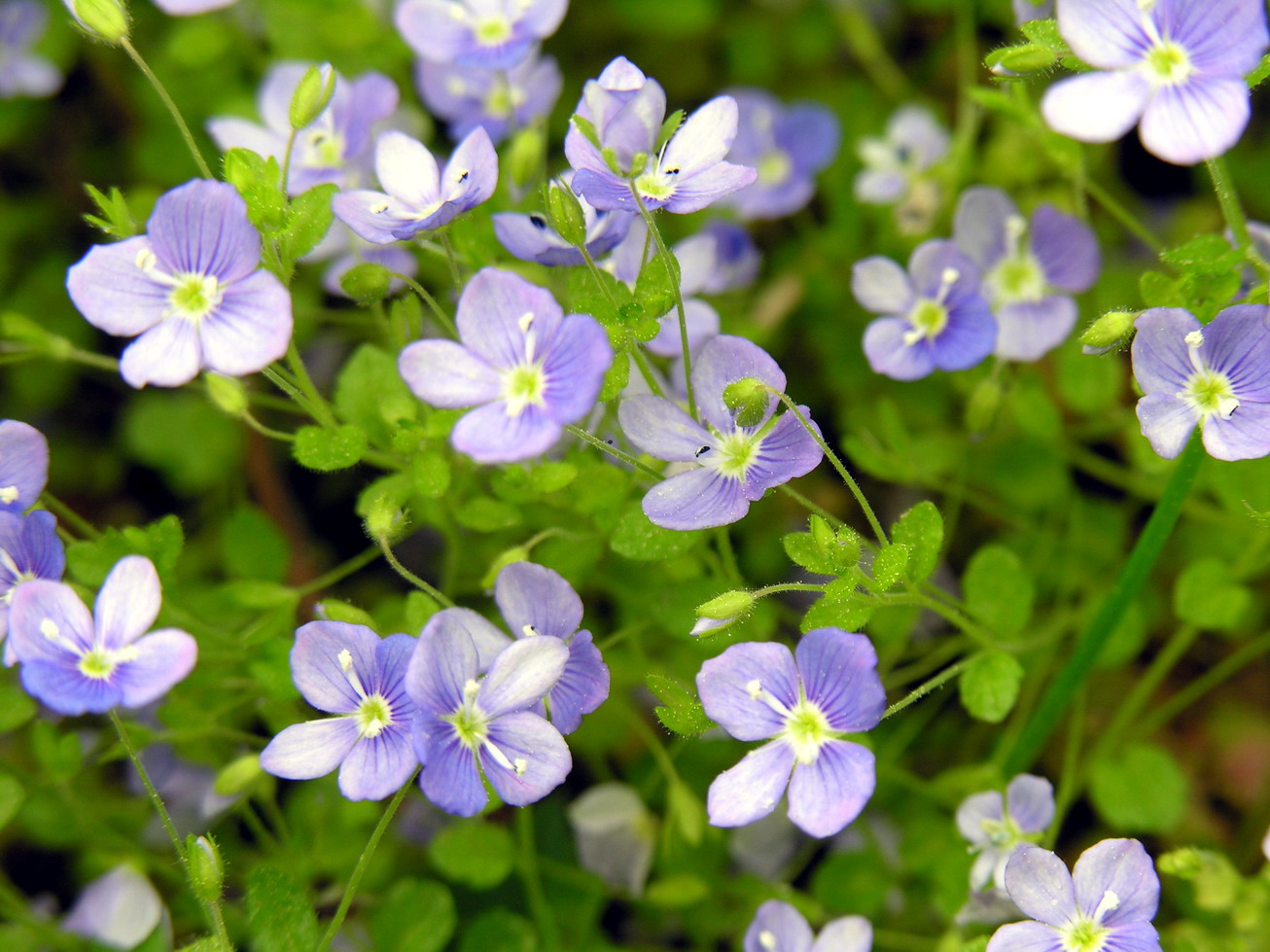 Siūlinė veronika (Veronica filiformis) Šeima. Gyslotiniai (Plantaginaceae) Foto: Algirdas, 2006 m. gegužės 17 d. Fotografuota apleistoje dvarvietėje.